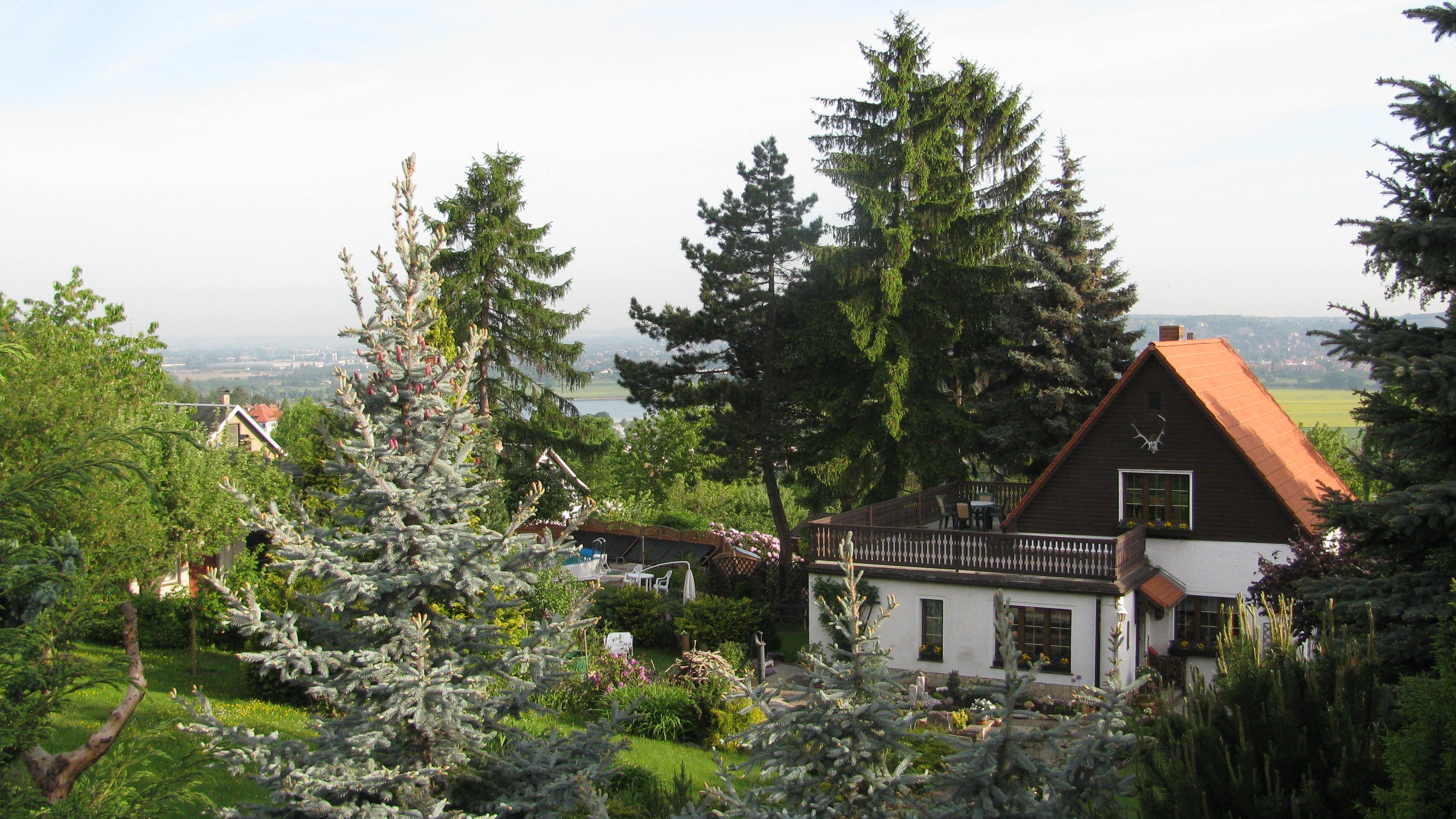 Wohnhaus in Neuleuteritz, im Hintergrund rechts Blick auf die Lößnitzhöhen in Radebeul, links Blick ins Elbtal in Coswig